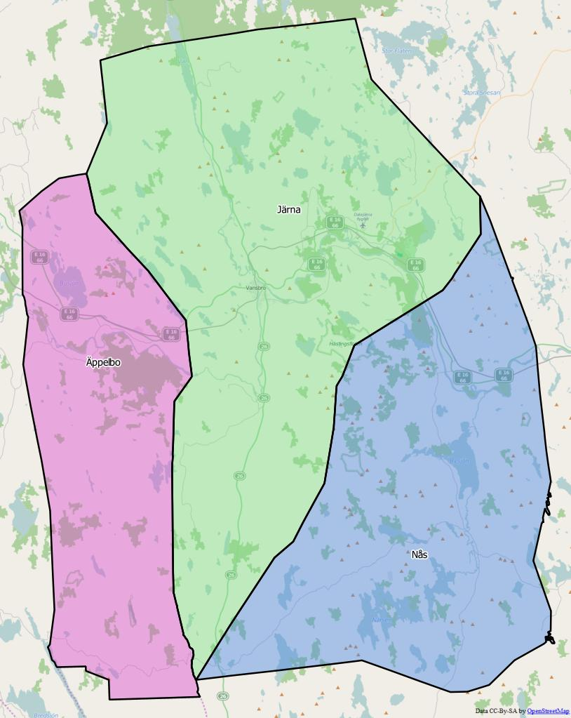 Distriktsindelningen i Vansbro kommun World file